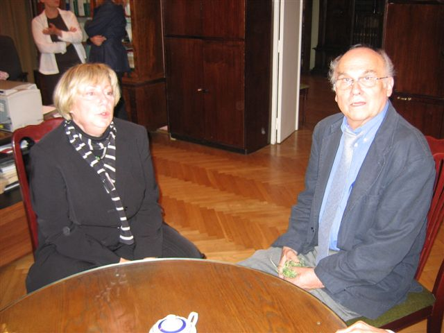 Ryszard Kapuściński (1932-2007), Polish writer and journalist and Ewa Lipska (b. 1945), Polish poet